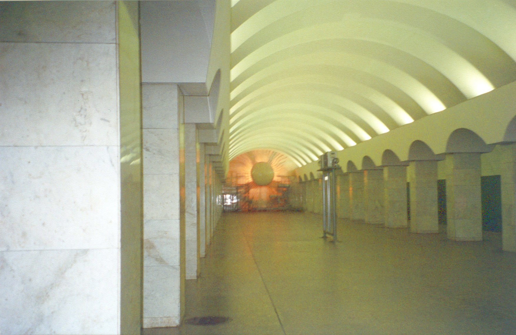 Станция «Лесная» Петербургского метрополитена